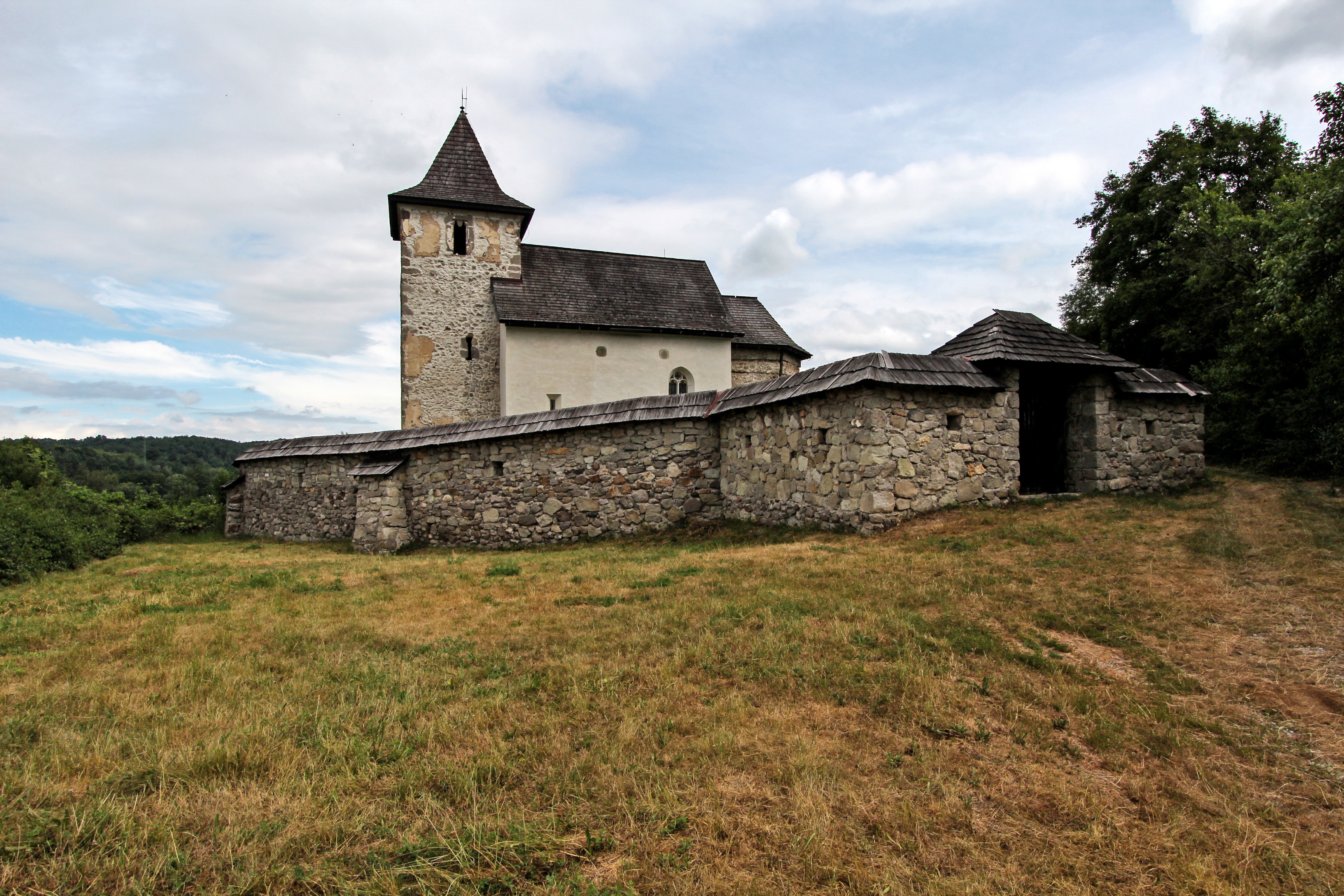 Kostol sv. Matúša, Zolná